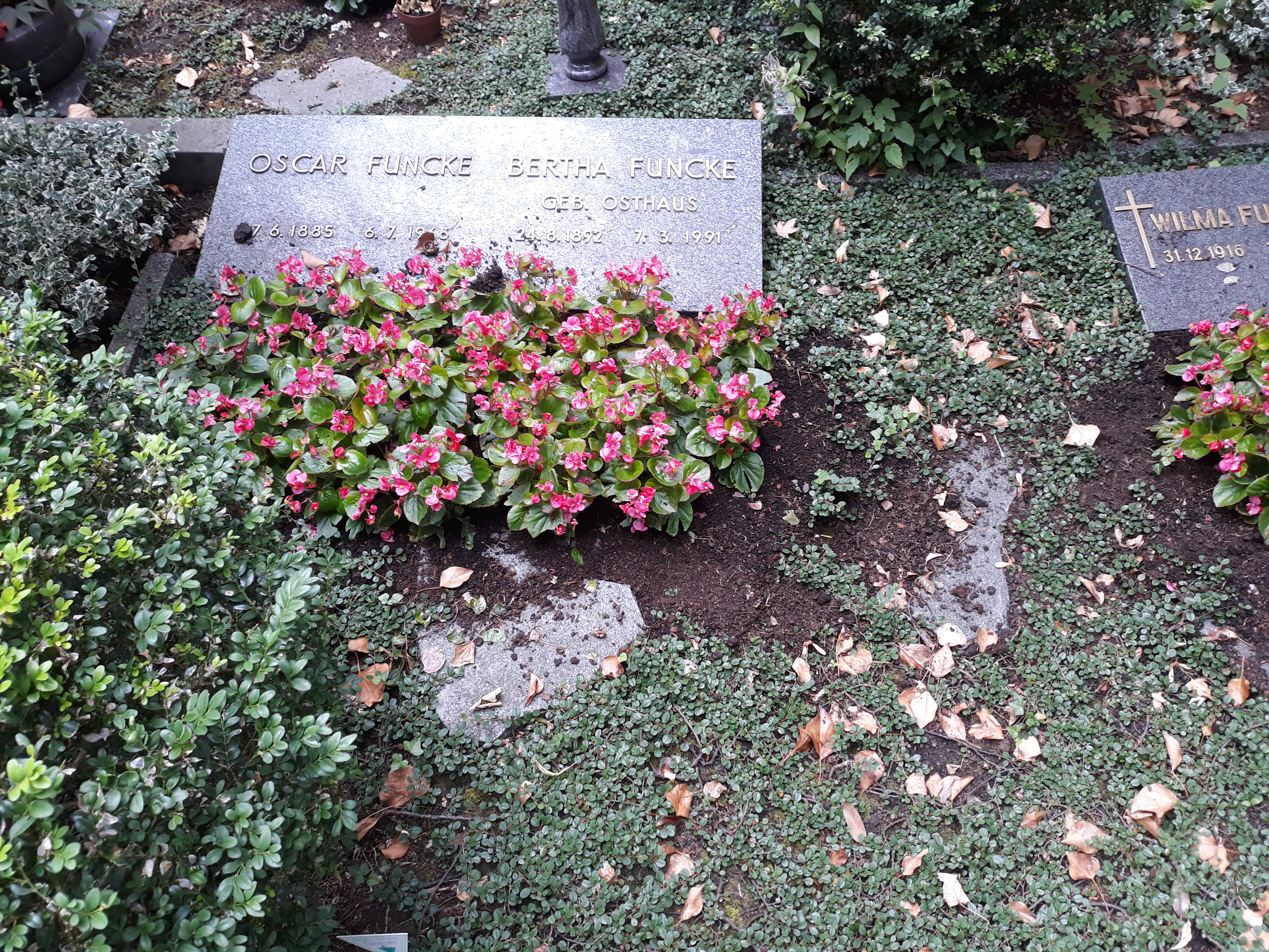 Das Grab des deutschen Unternehmers und Politikers Oscar Funcke und seiner Ehefrau Bertha auf dem Buschey-Friedhof in Hagen (Westalen).